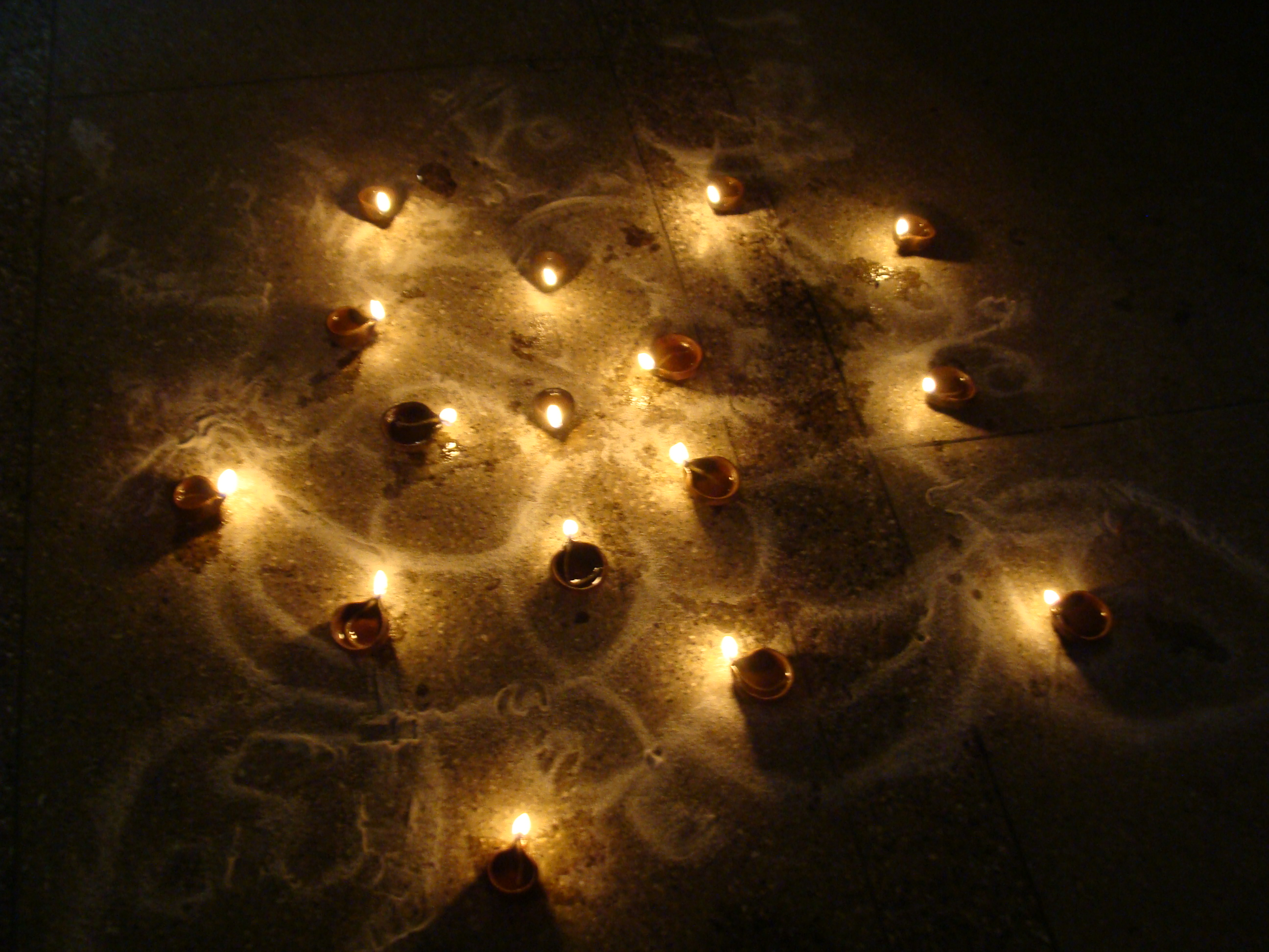 Kaarthigai, கார்த்திகை, கார்த்திகை-விளக்கு, கார்த்திகை-தீபம் a festival of Tamil-Nadu, India, falls on every year, in the month Kaarthigai, on the day Kaarthigai. According to literary sources, it has been celebrated from early Christ.